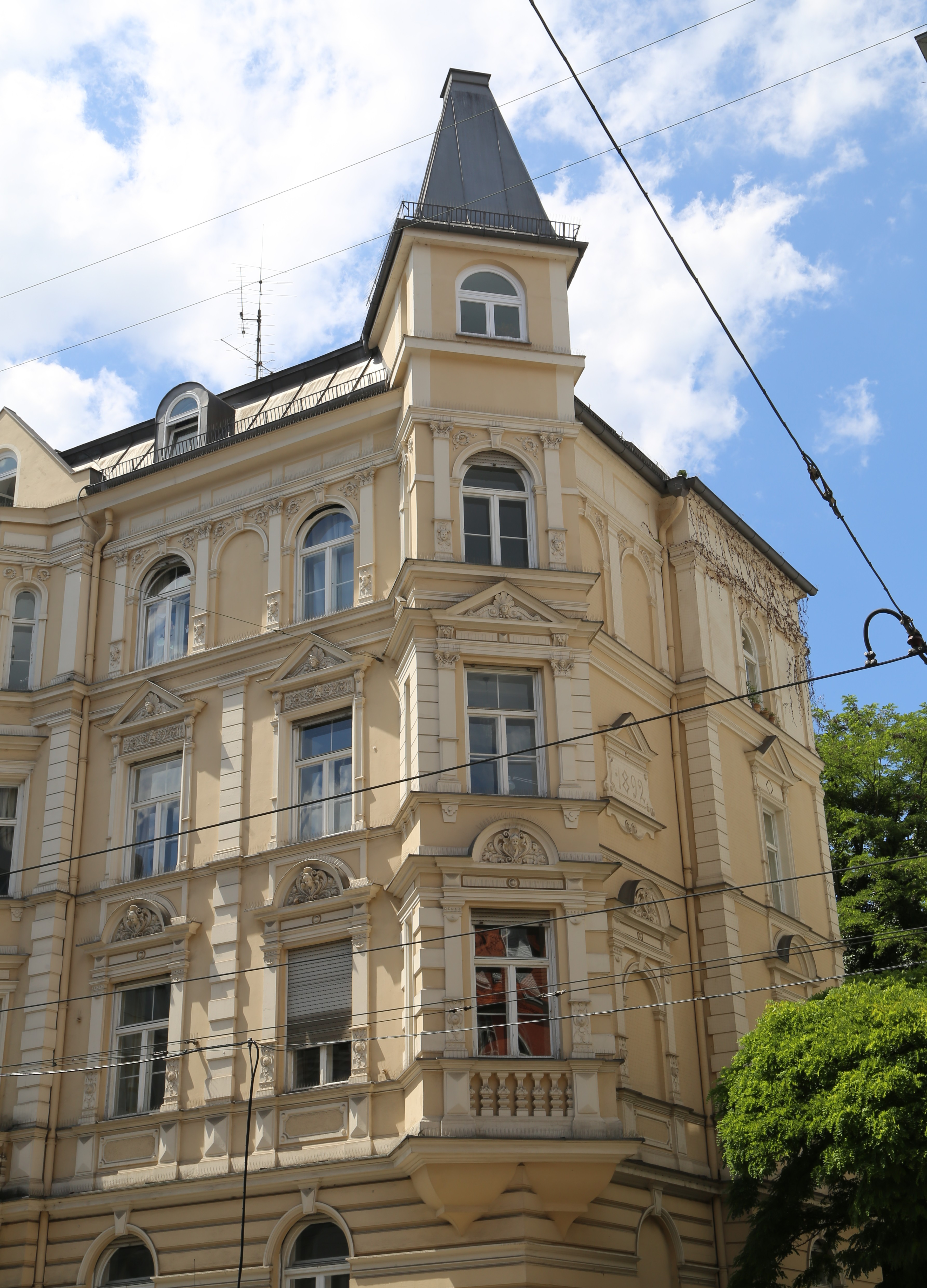 Müllerstraße 32 , München; Mietshaus, Neurenaissance, reich gegliedert und dekoriert, bez. 1892; bildet mit dem gleichartigen Haus Nr. 34 einen Block.